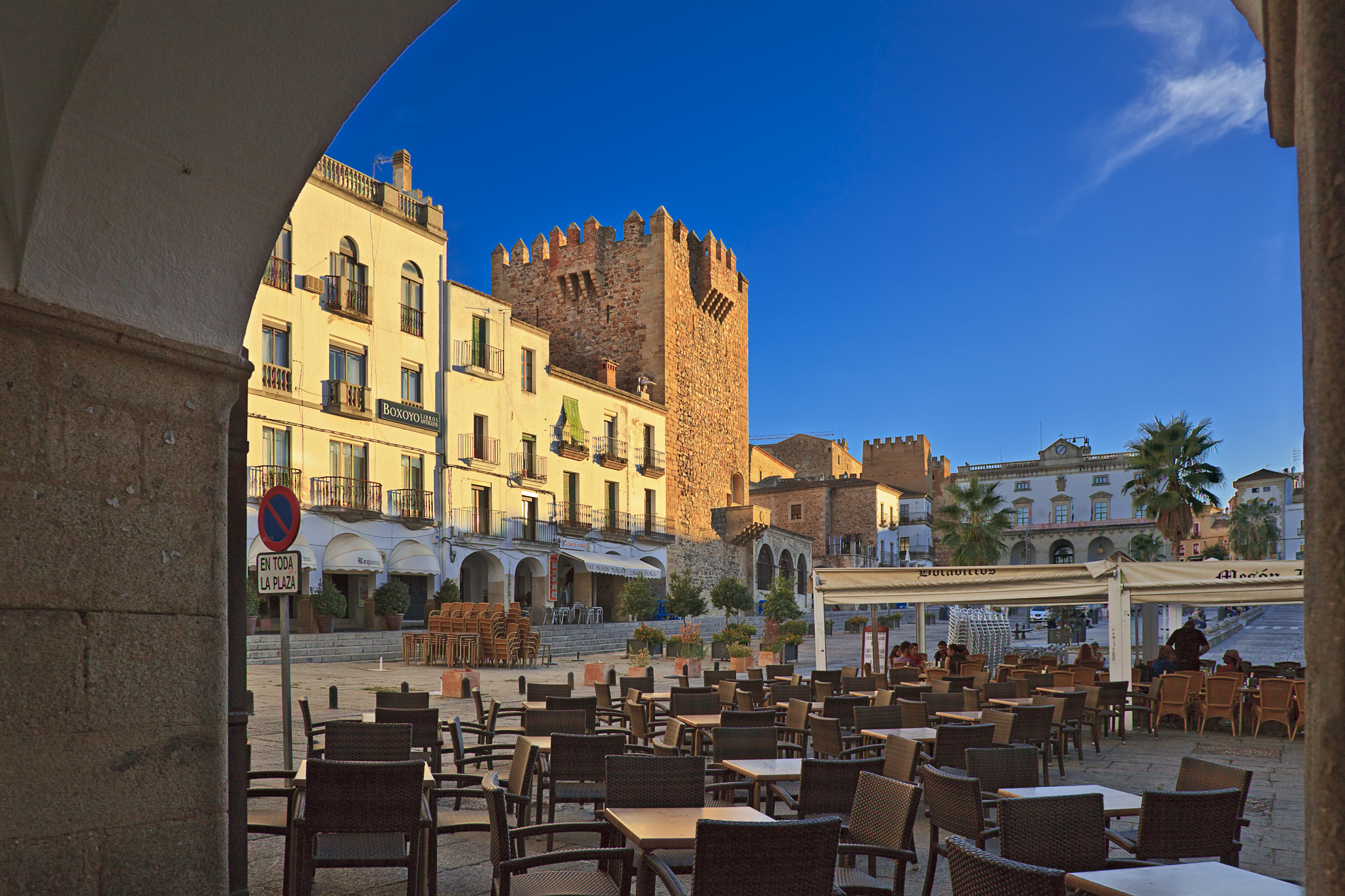 Cáceres. Mayor square. Extremadura. Spain